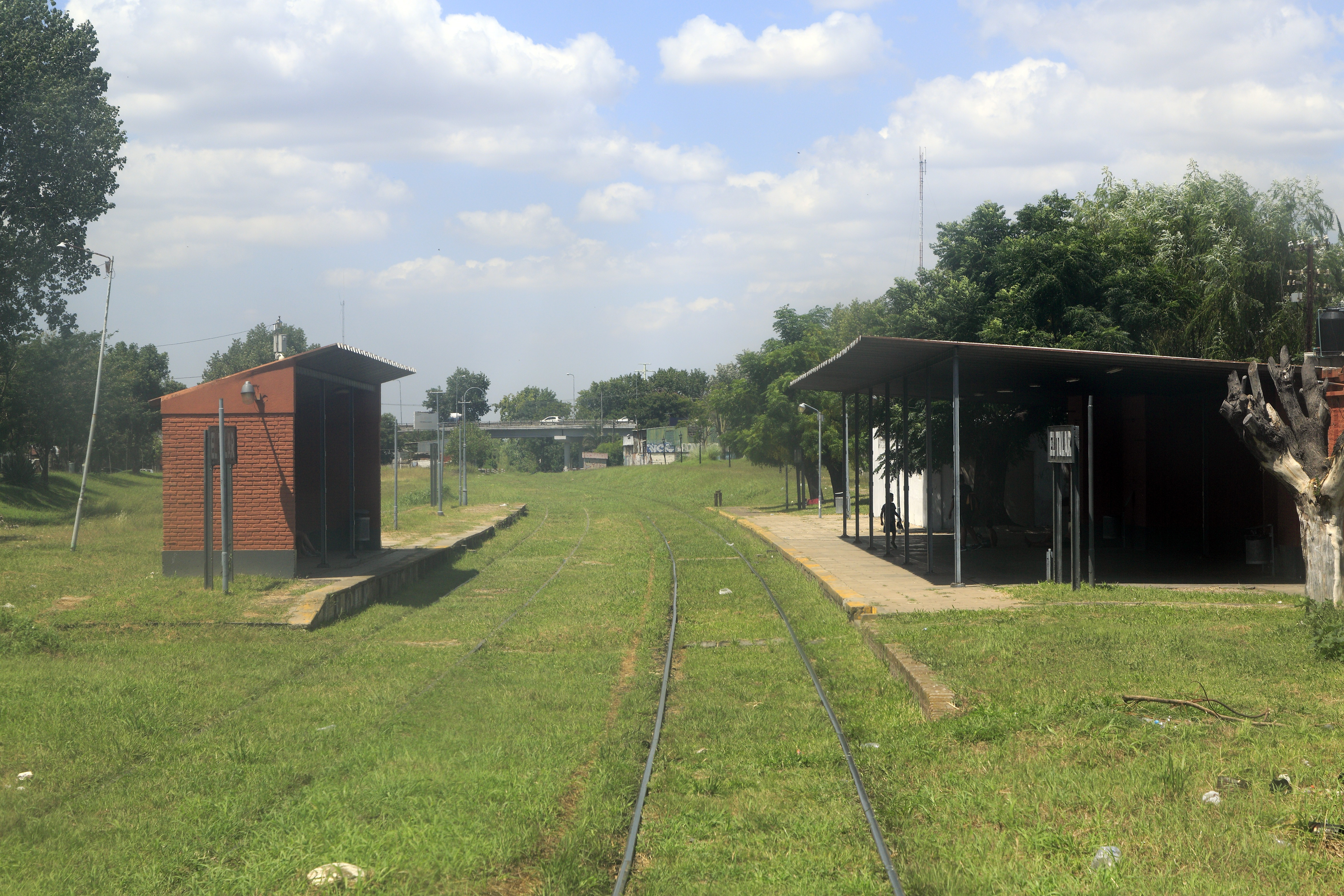 Richtung Victoria und damit Retiro, die Gleislängen zeigen, dass das Verkehrsumfang in der Vergangenheit wesentlich größer gewesen sein muss. Immerhin wird das Gras im Bahnhofsbereich regelmäßig gemäht, doch eigentlich sollte ein Bahnhof keine Wiesenfläche sein. Das Kreuzungsgleis ist in Betrieb, die blanken Schienenfahrflächen zeigen, dass es auch befahren wird. Nach Aussagen des Personals ist eine Grundsanierung der Strecke gelant.